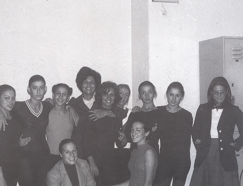 Las componentes de la selección nacional de gimnasia rítmica de España en 1975 (o 1974), en la preparación previa para el Mundial disputado en Madrid. De pie, de izquierda a derecha: María José Pepa Molina Barceló, María Jesús Alegre Etayo, África Blesa Bort, Ivanka Tchakarova (seleccionadora nacional), Carmen Algora Sanjuan (entrenadora), María Eugenia Rodríguez Moreno, Rosa Hernández Panadero, Carmen Lorca Sánchez y Rosa Centenero Banegas (entrenadora). Abajo: Manuela Fernández del Pozo (entrenadora) y Leticia Herrería de la Lastra.